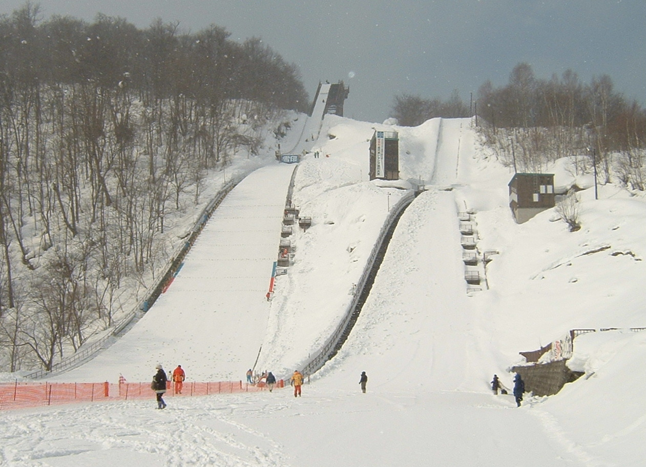 旭川・嵐山シャンツェ Asahikawa-ArashiyamaSchanze スキージャンプ競技場